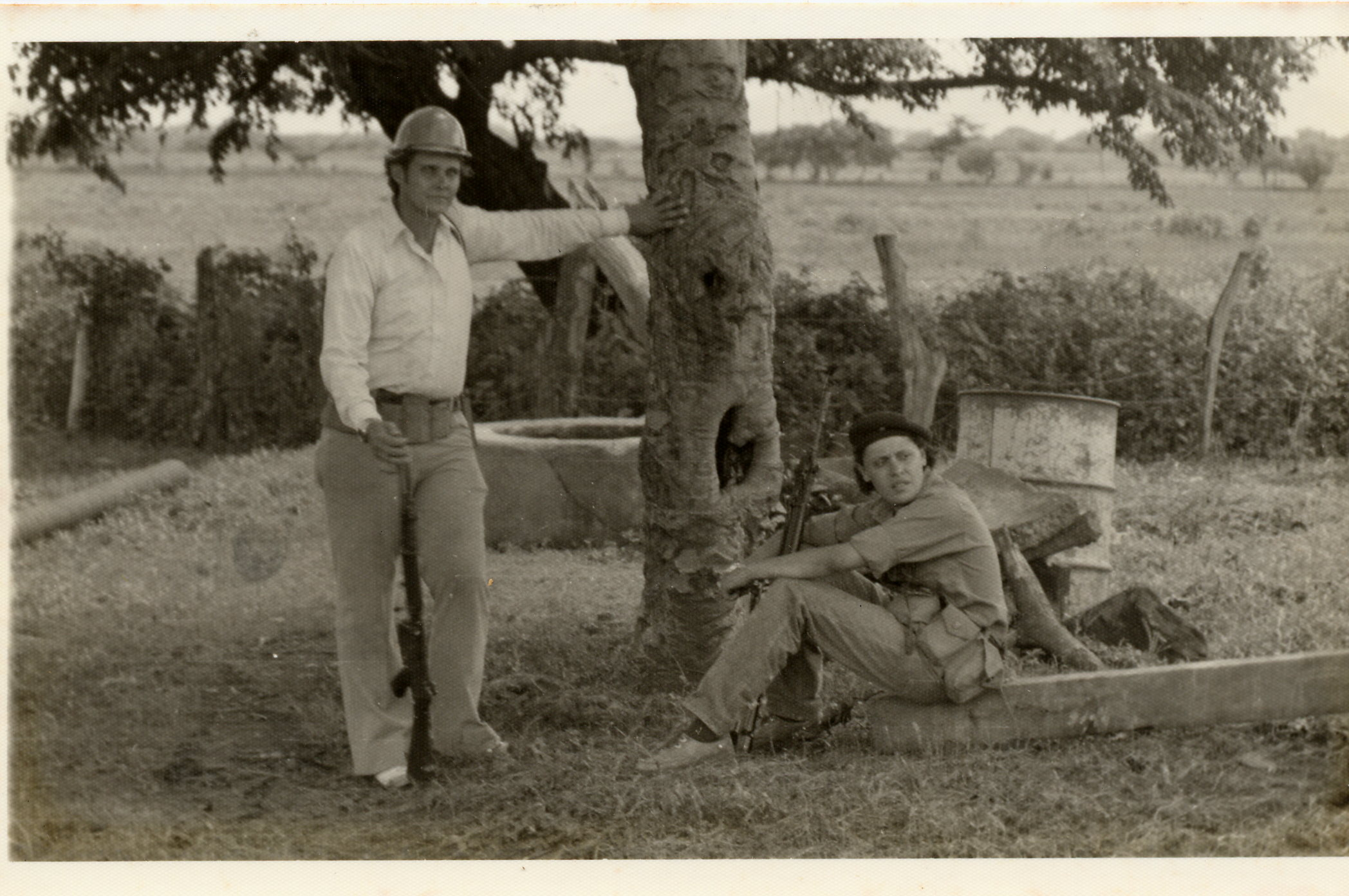 Chepón Robelo y Dora María Insurrección de León 1979 Imágenes de las acciones militares durante la insurrección de León y de la destrucción causada por los bombardeos de la Fuerza Aérea Nicaragüense (FAN) de la GN. durante los meses de junio y julio de 1979